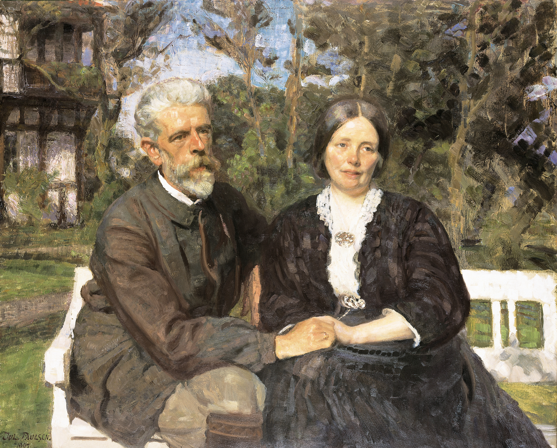 Frederikke and Laurits Tuxen in the garden at Skagen